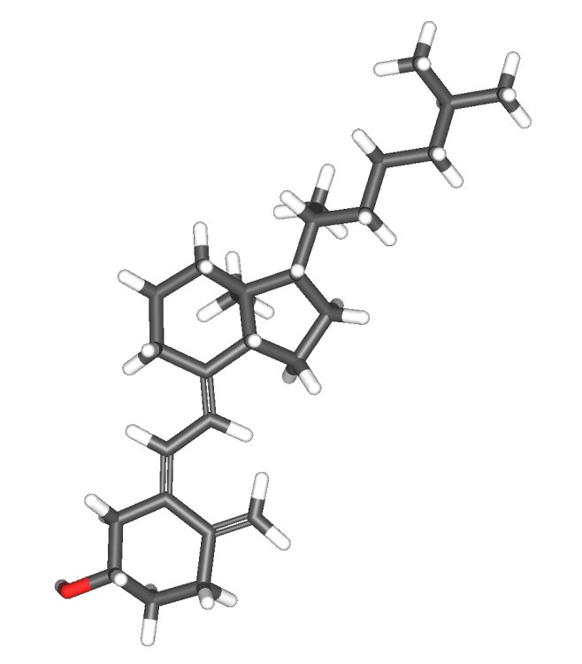 ვიტამინი D